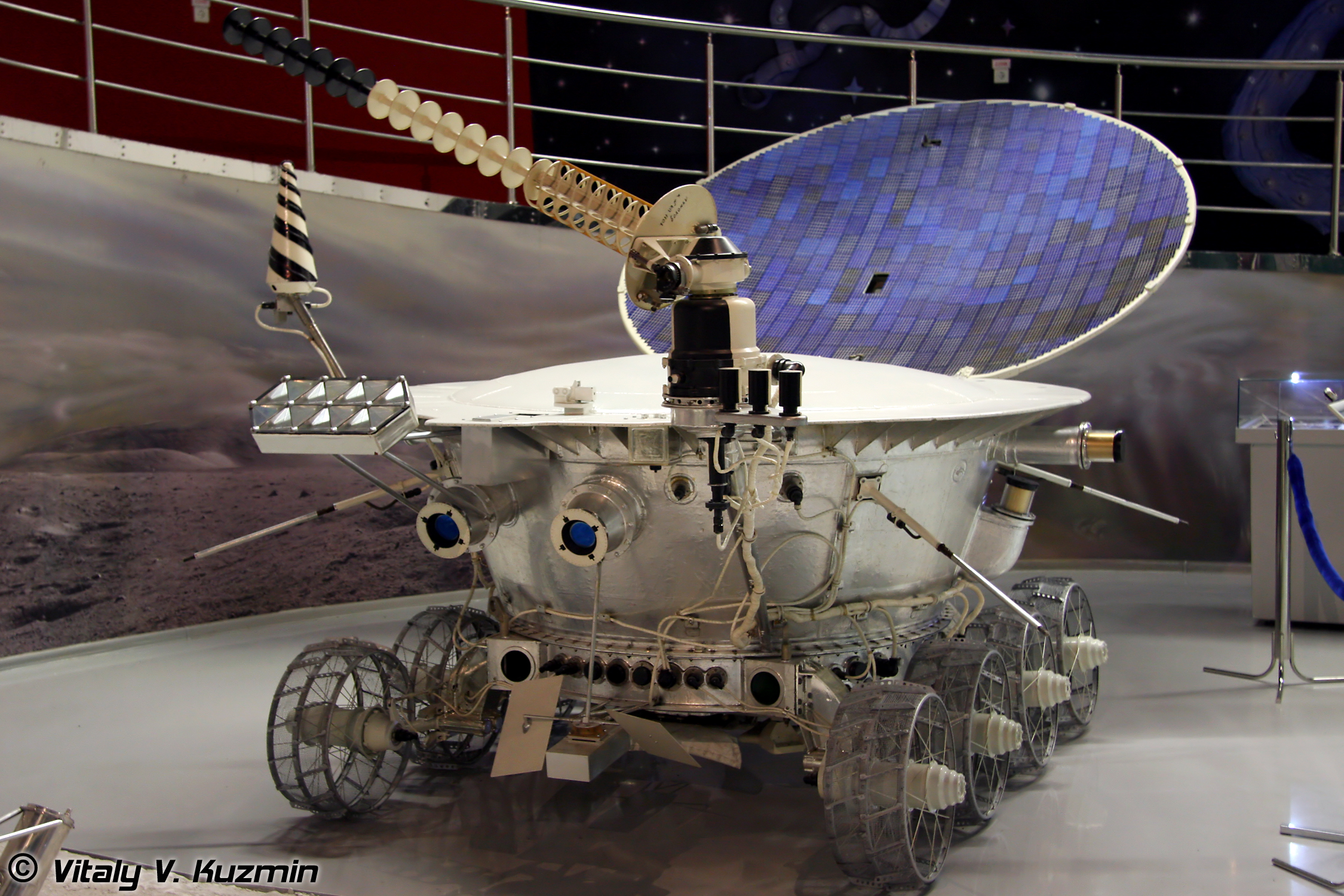 Луноход-1